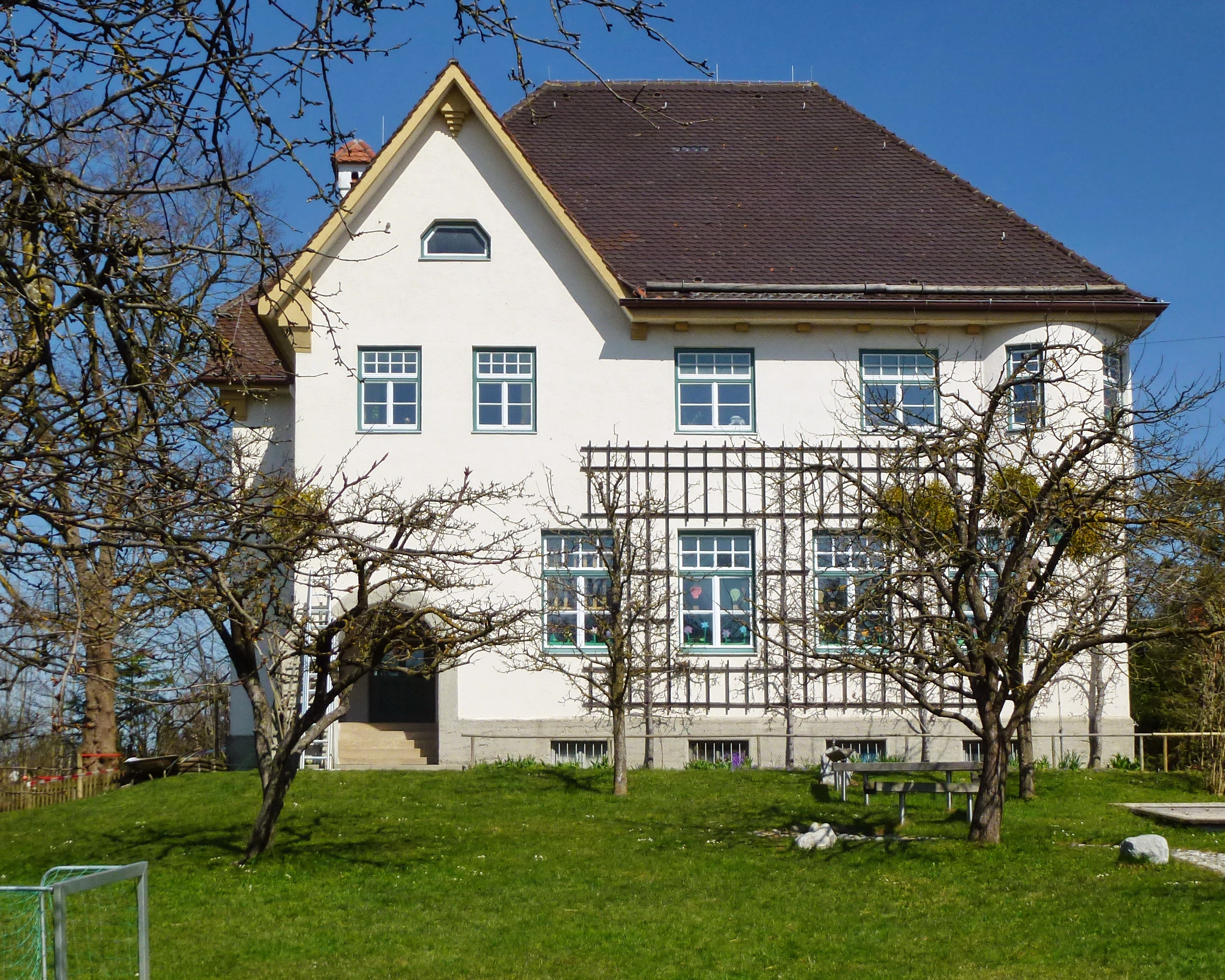 Windach-Schöffelding, Peter-Endres-Str.1, Ehemaliges Schulhaus, Ansicht von S